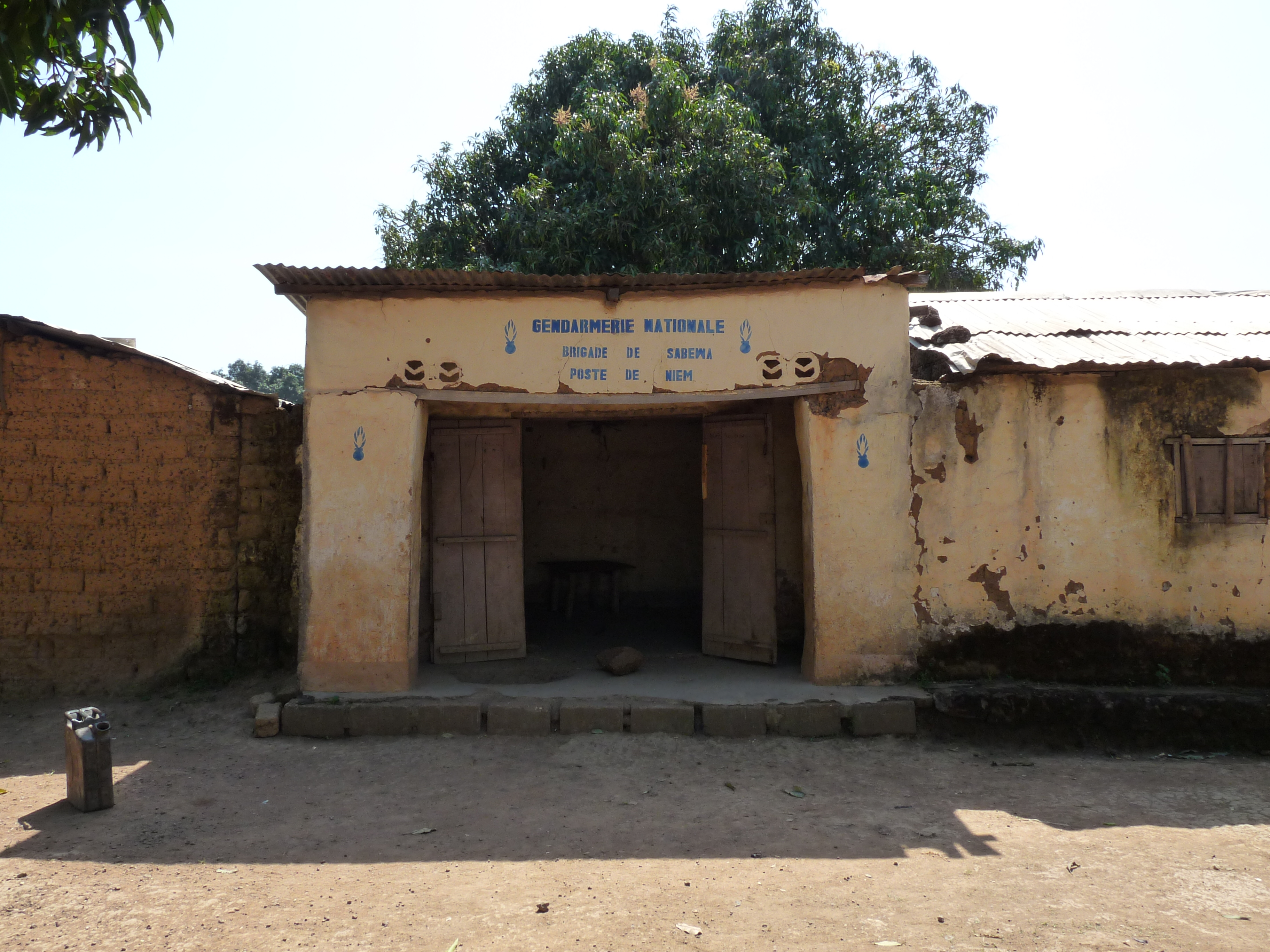 Poste de gendarmerie de Niem, dans la préfecture de la Nana-Mambéré, Centrafrique.